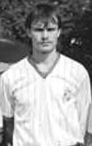 Title: Mannschaftsfoto FC Rot-Weiß Erfurt Factual corrections and alternative descriptions are encouraged separately from the original description. Additionally errors can be reported at this page to inform the Bundesarchiv. Original historic description: ADN-ZB-Hirndorf-10.8.89-ma-Erfurt: Fußball-Oberliga-Saison 1989-90. Die Mannschaft des FC Rot-Weiß Erfurt. Obere Reihe von links: Heiko Räthe, Carsten Sänger, Holger Bühner, Ronald Baumbach, Uwe Abel, Wolfgang Döring und Frank Holick. Mittlere Reihe von links: Trainer Wilfried Gröbner, Oliver Merkel, Uwe Weidemann, Mario Dappe, Thomas Linke, Frank Dünger, Andreas Hintke, Gerd Seifert und Trainerassistent Dieter Göbel. Vorn von links: Holger Demme, Steffen Dünger, Gerd Sachs, Rainer Hoffmeister, Steffen Kraus, Jürgen Heun und Armin Romstedt.